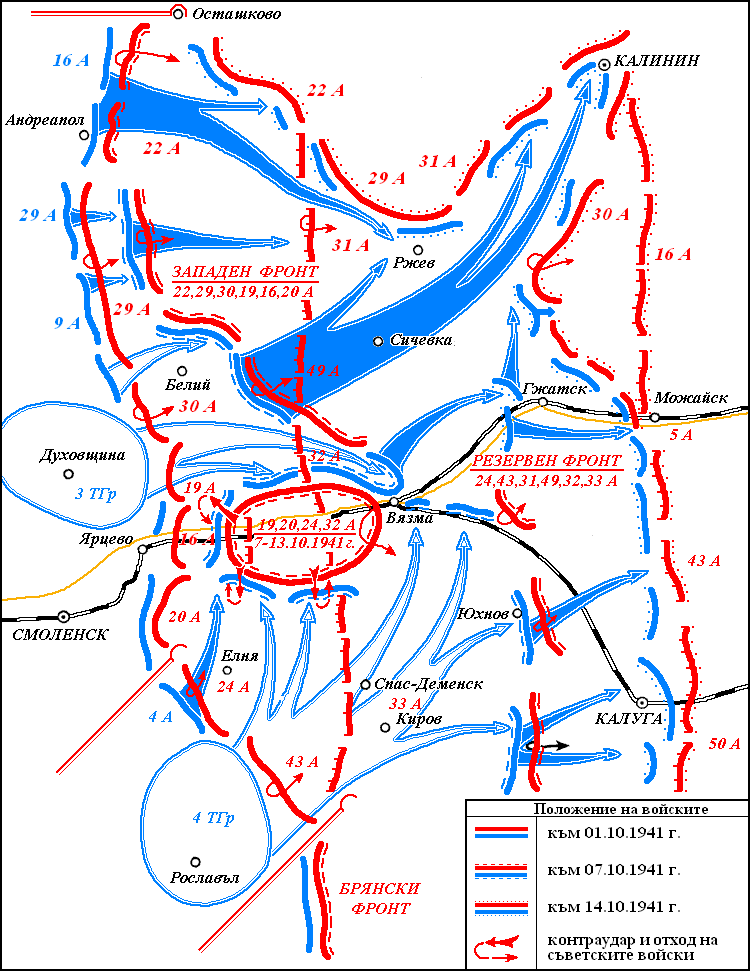 Любомир Таушанов, 2005 г.